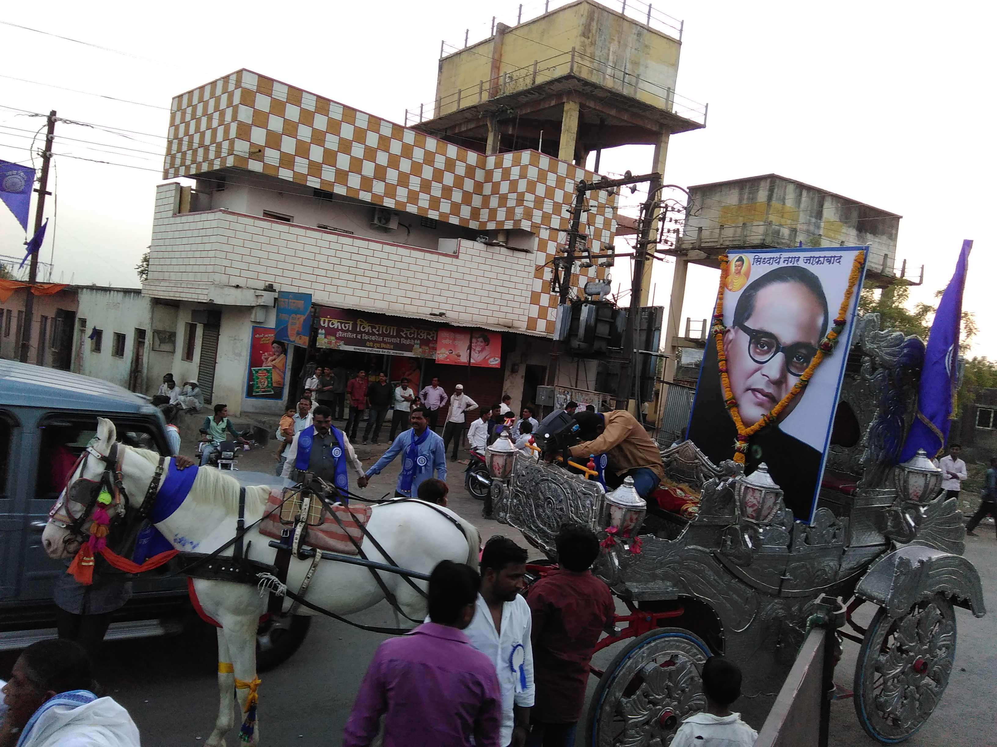 जालना जिल्ह्यातील जाफ्राबाद शहरात विश्वरत्न डॉ. बाबासाहेब आंबेडकर यांची १२६ वी जयंती साजरी करतांना लोक